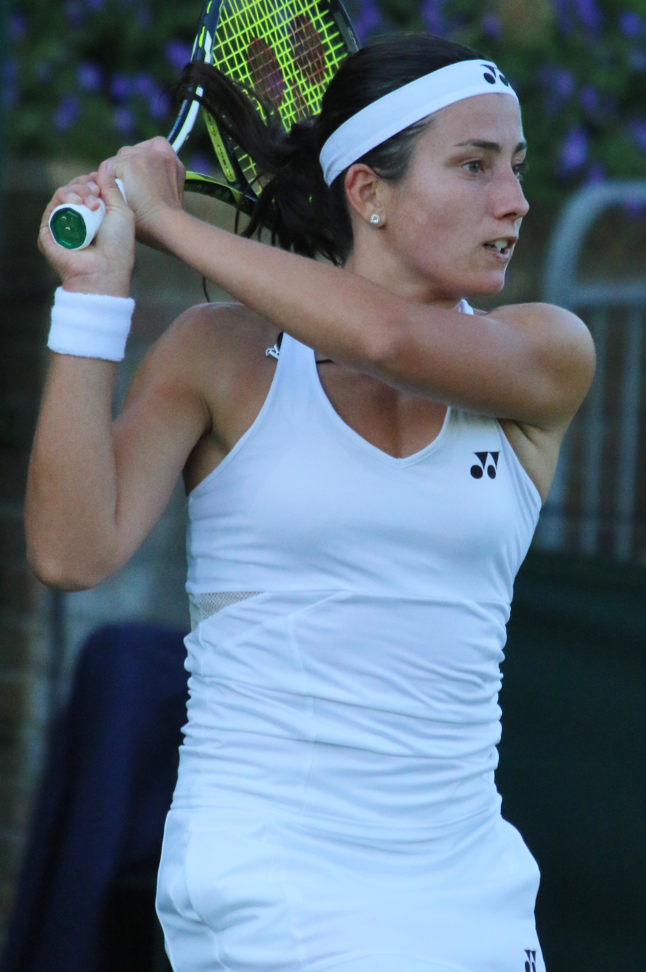 Sevastova WM17 (15)